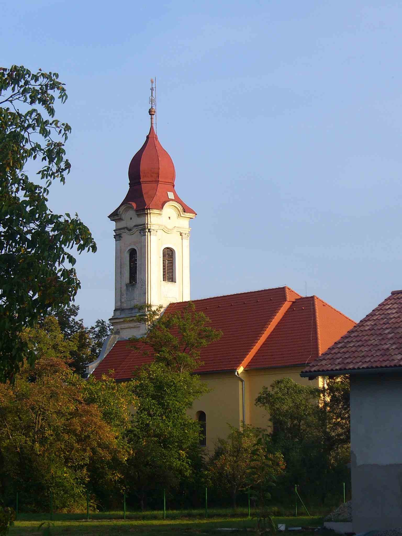 Evanjelický a. v. kostol z roku 1800